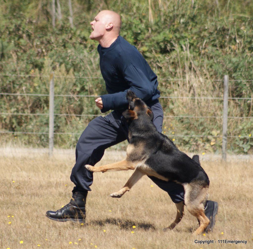 NZ Police Dog